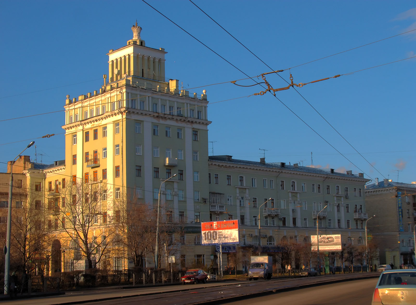 Cталинка в Московском районе Казани (улица Декабристов)